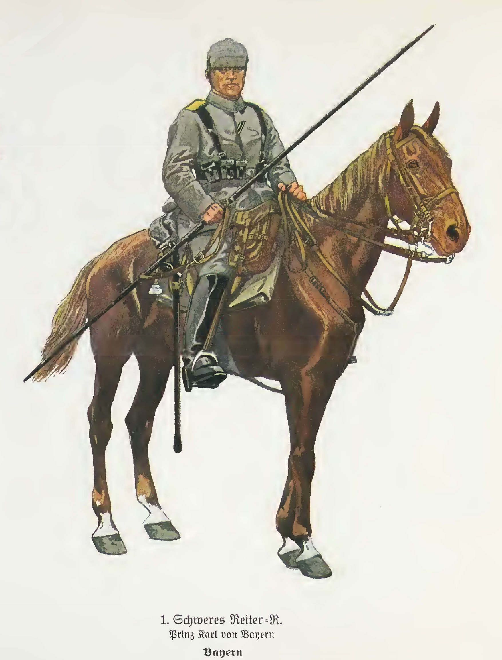 Reiter des Bayerischen 1. Schweres-Reiter-Regiments in feldgrauer Uniform, 1915